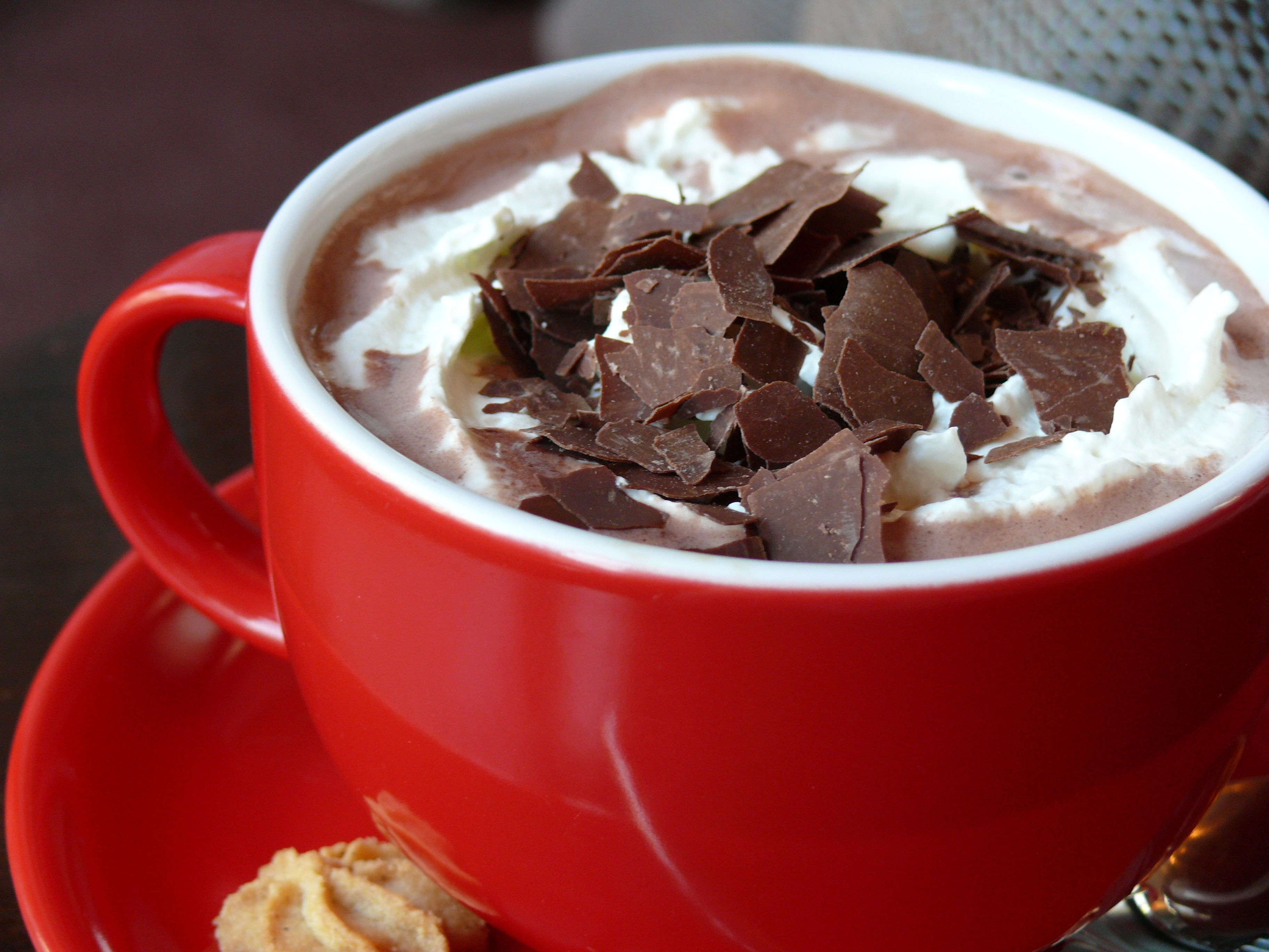 Heiße Schokolade von Charlottes Enkel